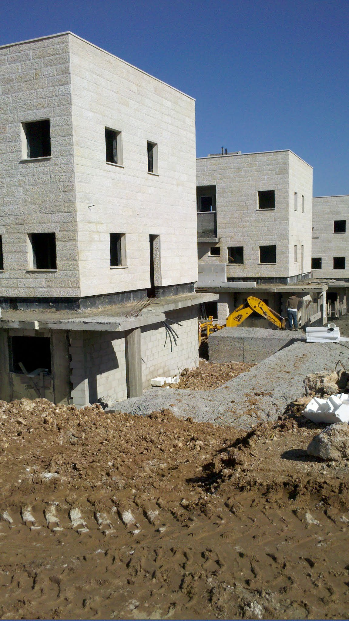 תנופת פיתוח בשכונה החדשה, עלי זהב, 2012